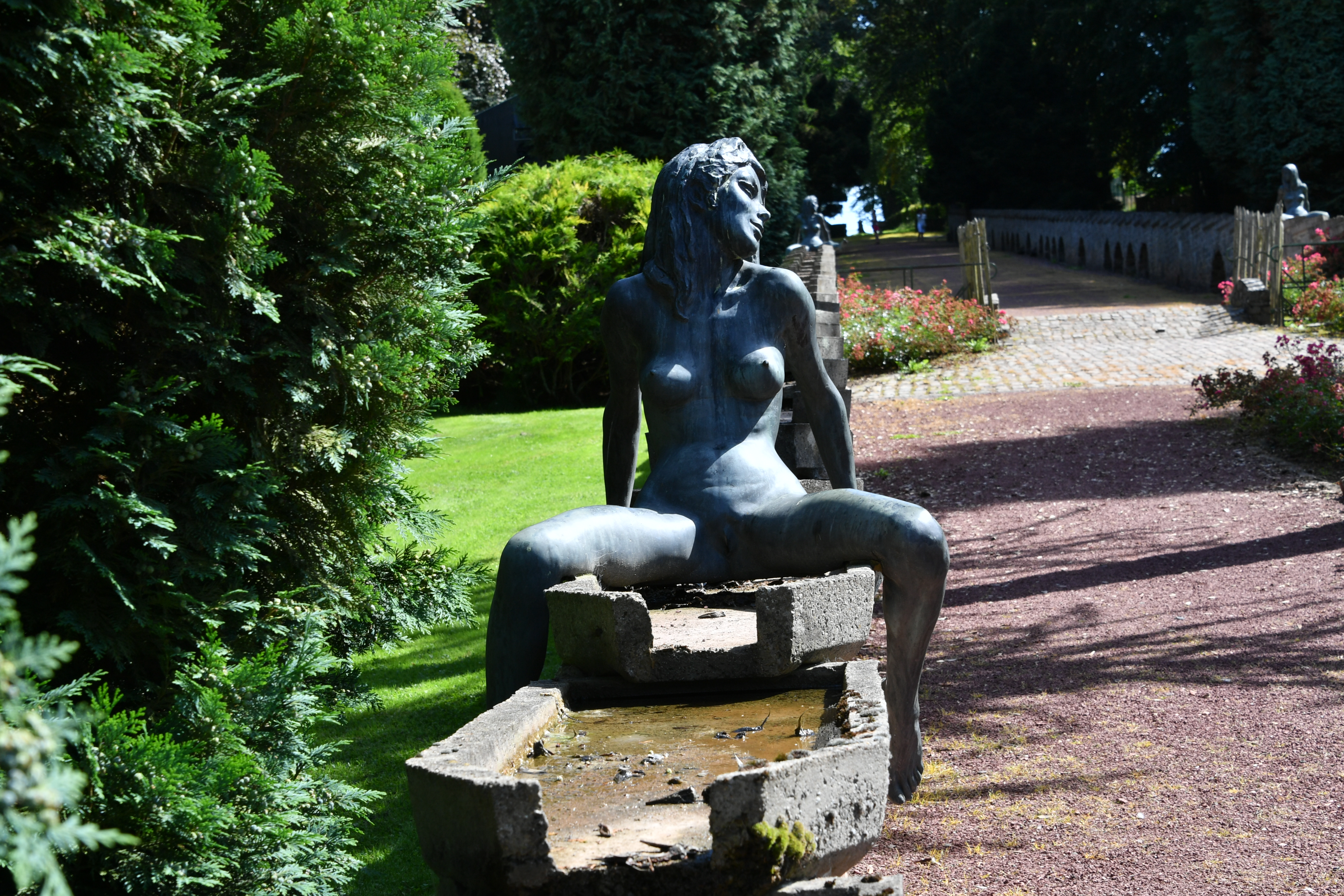 Chateau de Jehay